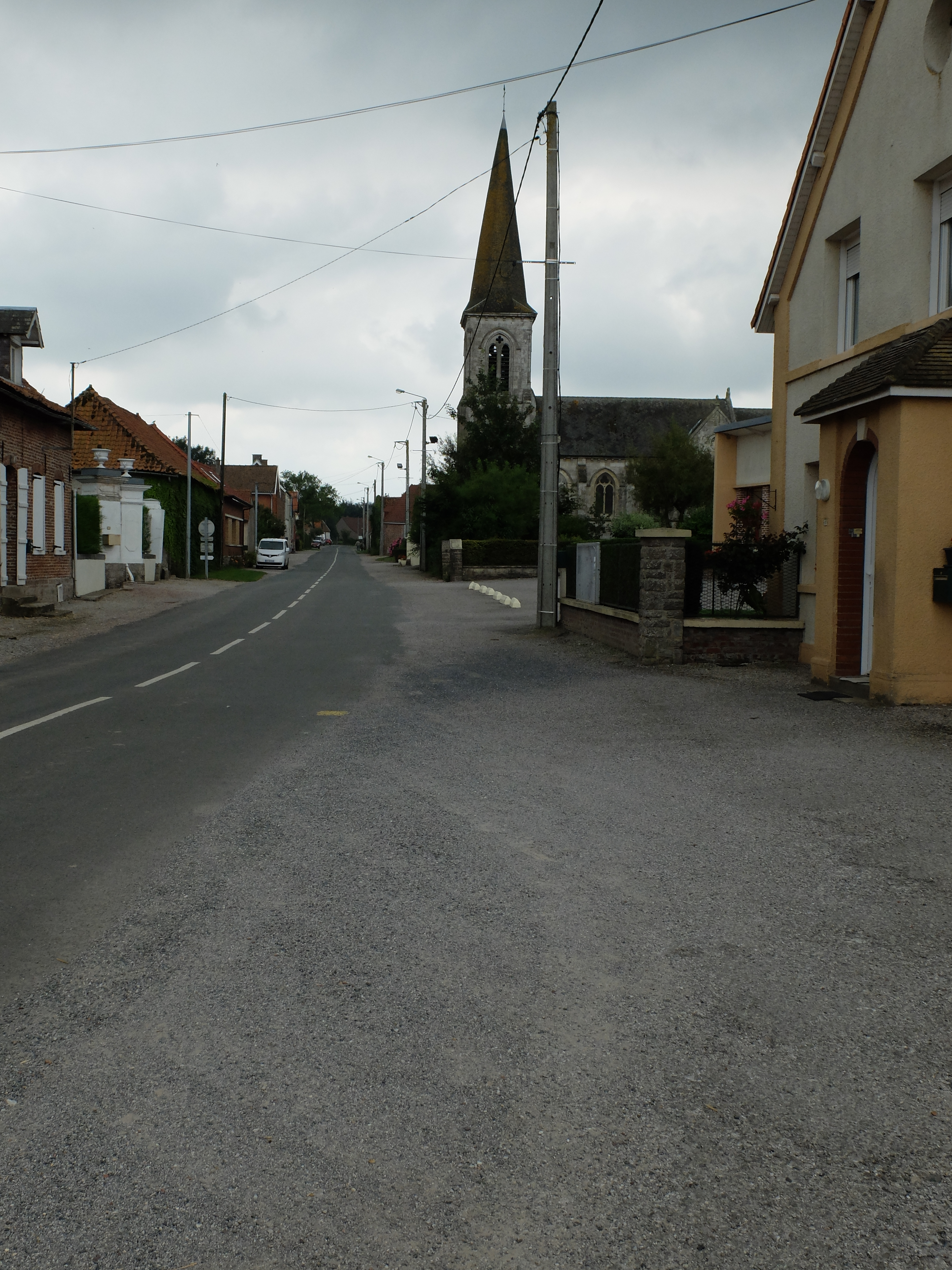 Vue de la rue principale de Troisvaux.